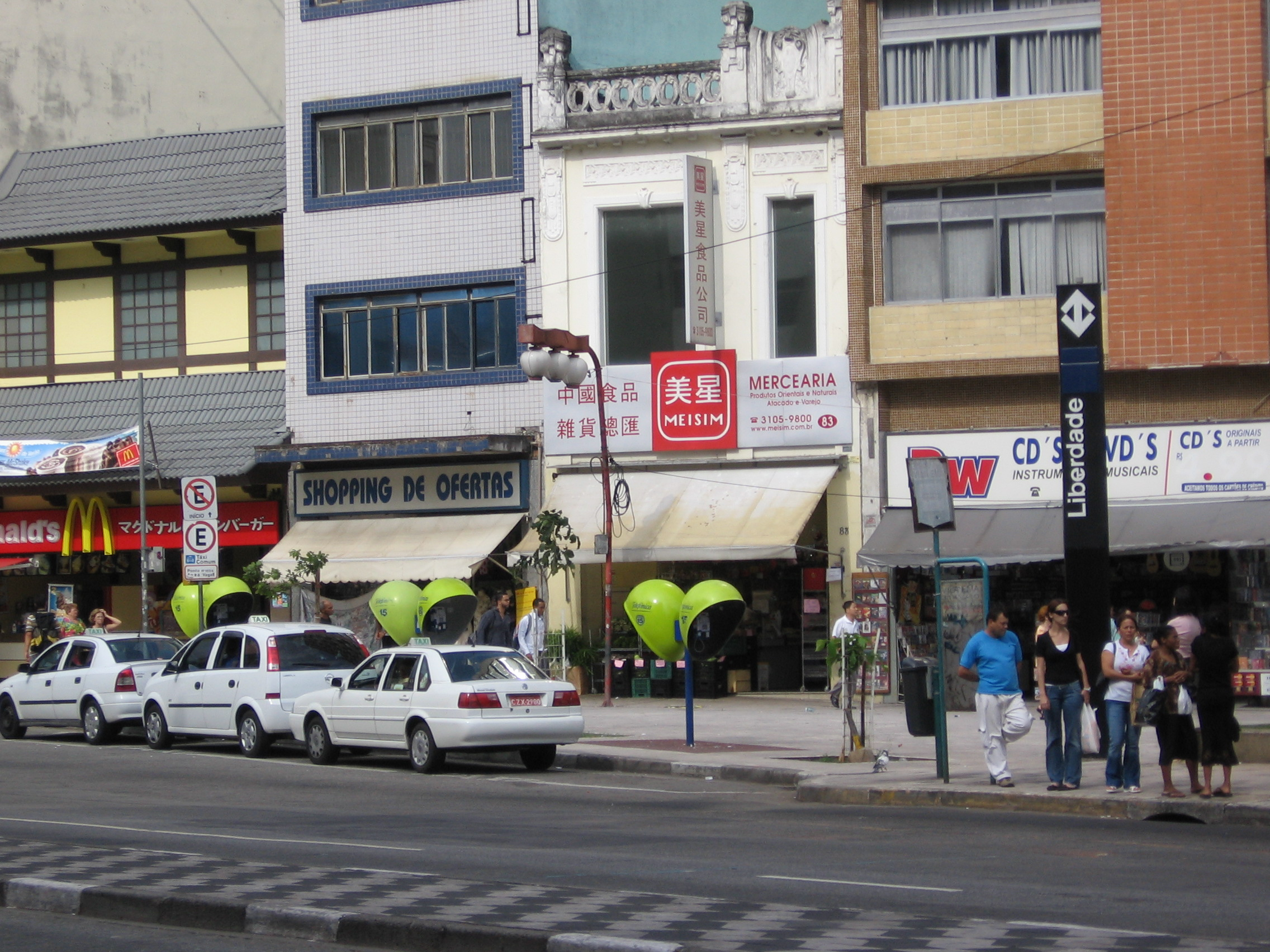 Fotografia do bairro paulista da Liberdade, próximo da estação do Metrô de mesmo nome, mostrando as várias línguas dos letreiros e o marco do acesso ao Metrô. Batida por Luis Dantas com uma câmera Casio A520 em 2 fev 2007.